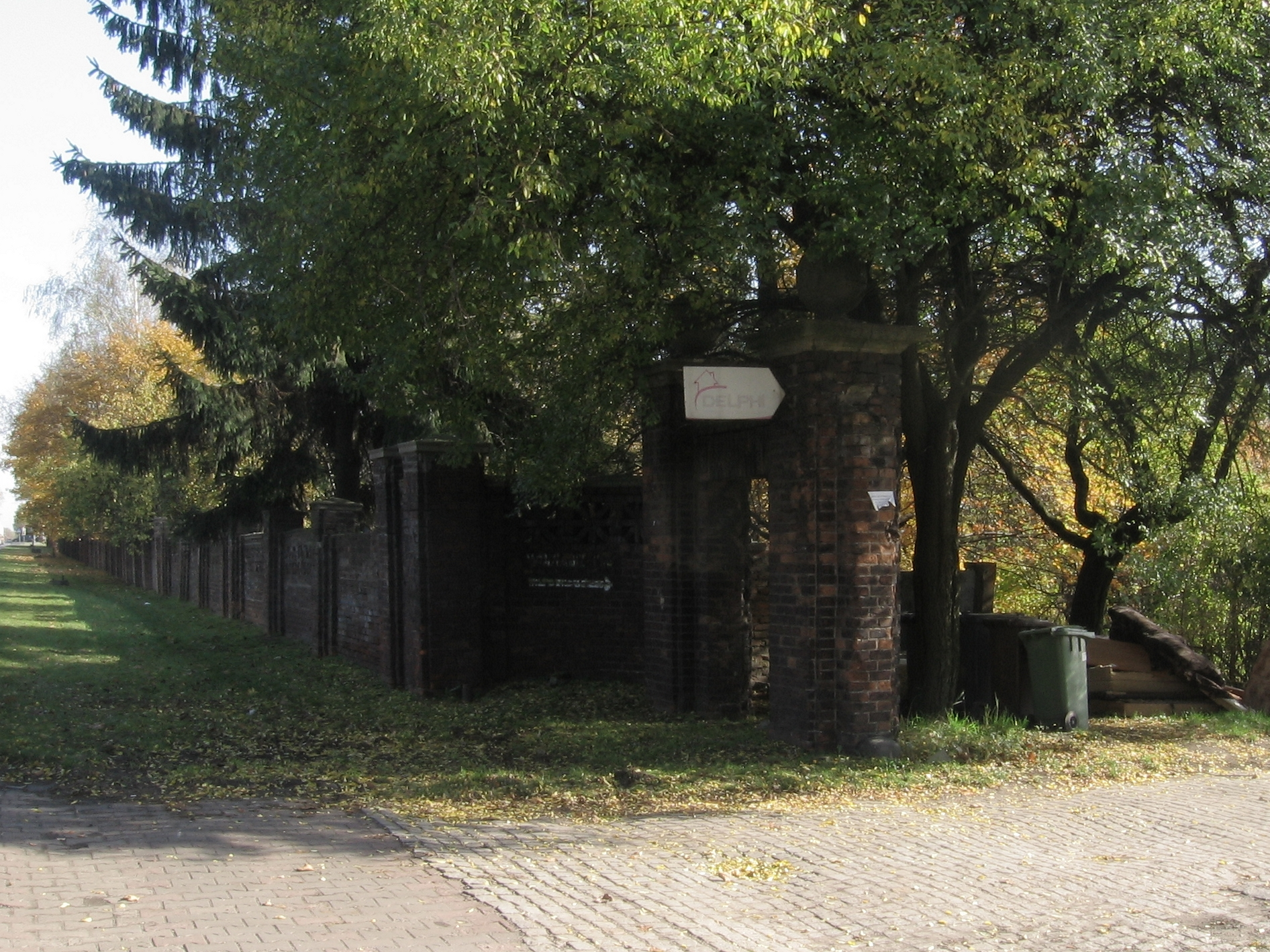 Murowane ogrodzenie i fragment bramy kopalni Neue Bleischarley (późniejsze Zakłady Górnicze im. Juliana Marchlewskiego) w Bytomiu, ul. Siemianowicka.